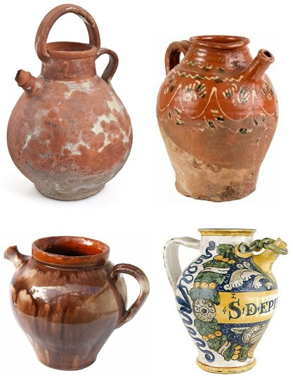 Kannenformen. Bügel- und Henkelkannen mit Tüllausguss (Tüllenkannen), Keramik.